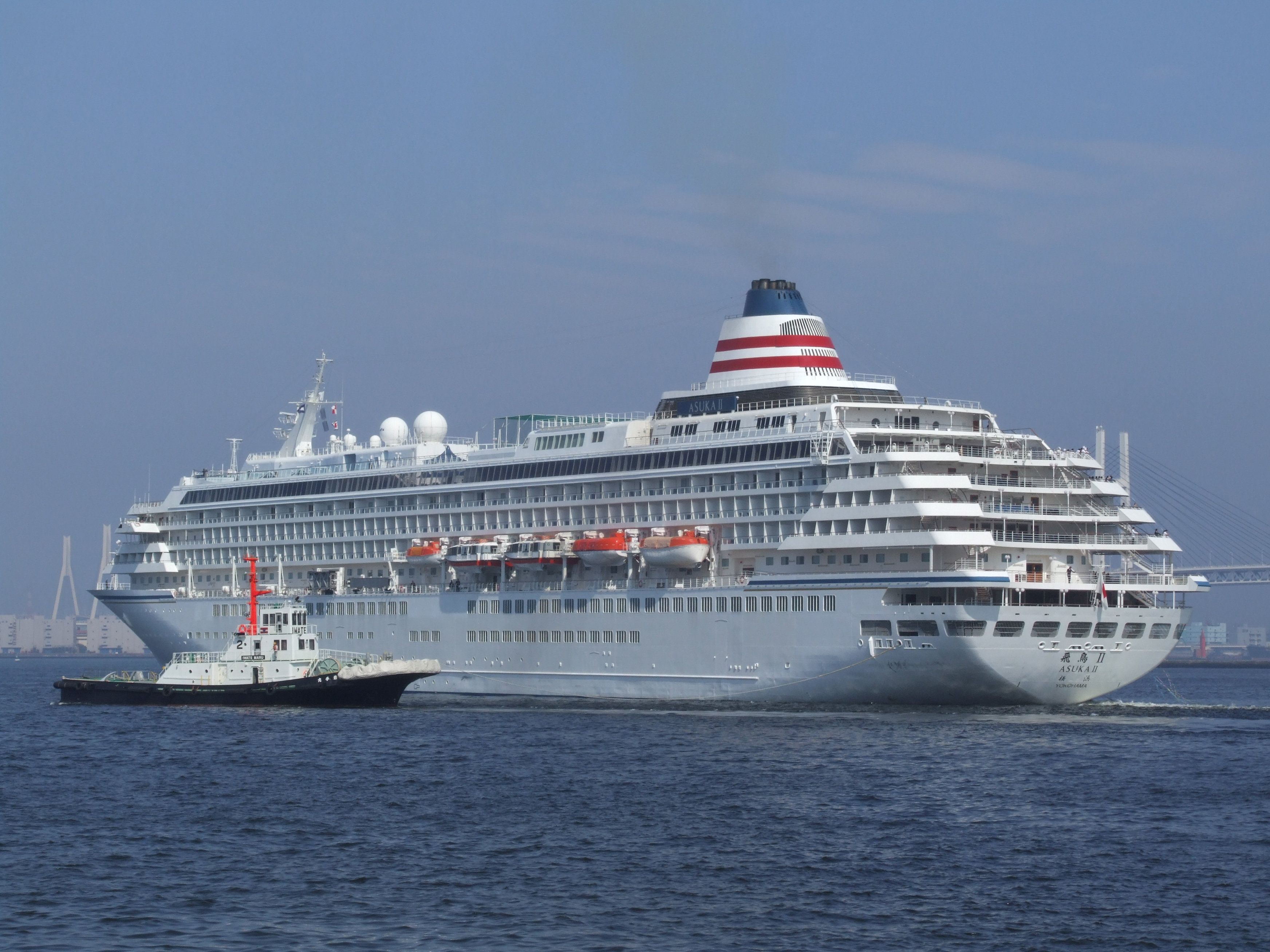 左斜め後方